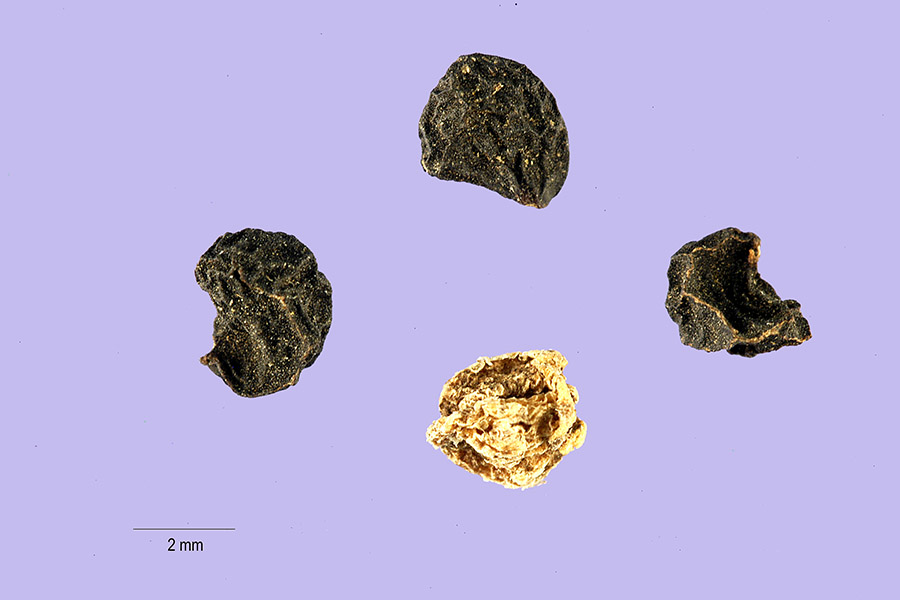 Allium nigrum L. - black garlic